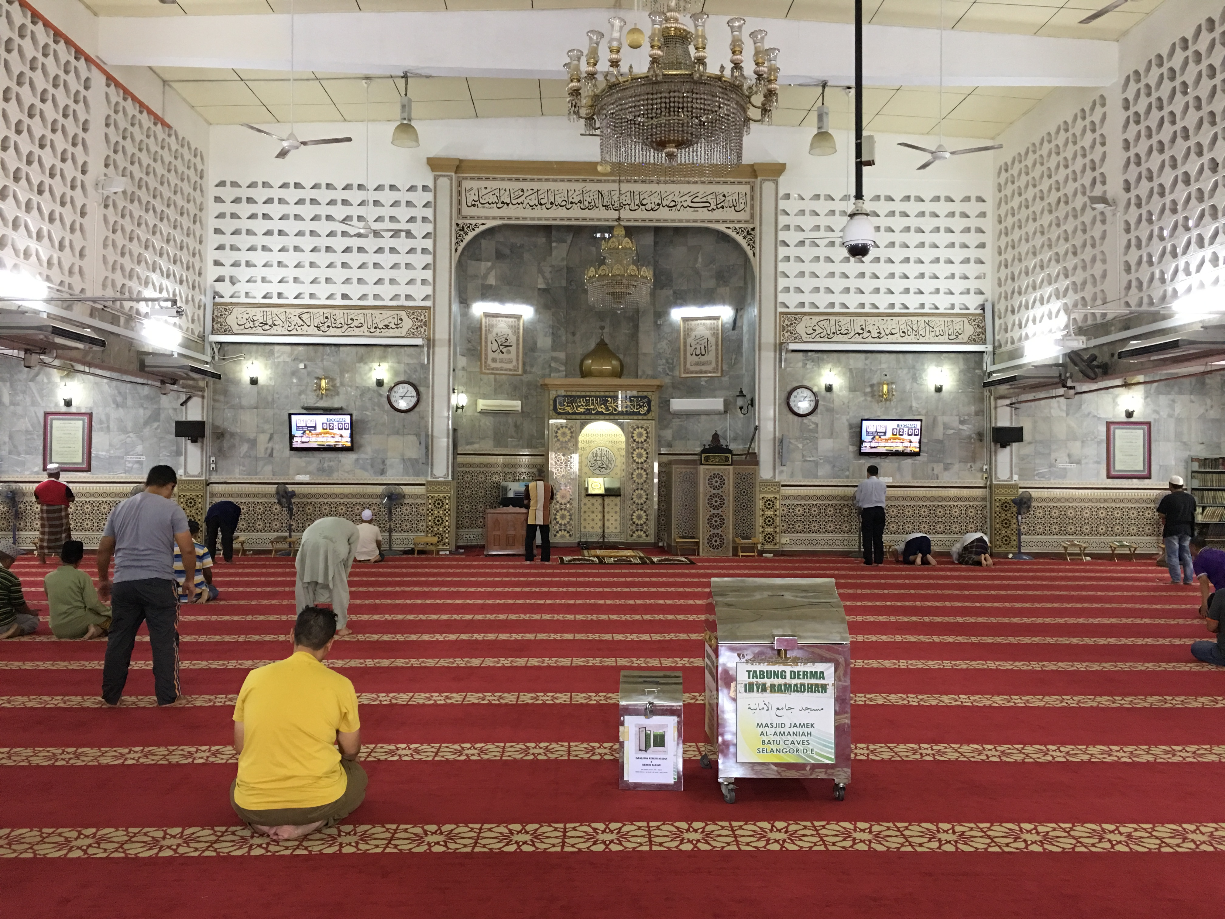 Masjid Al-Amaniah Batu Caves